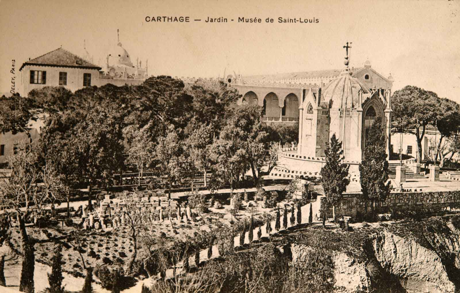 Jardin de la chapelle St Louis de Carthage et les nouveaux bâtiments (actuel musée national de Carthage) à l'arrière